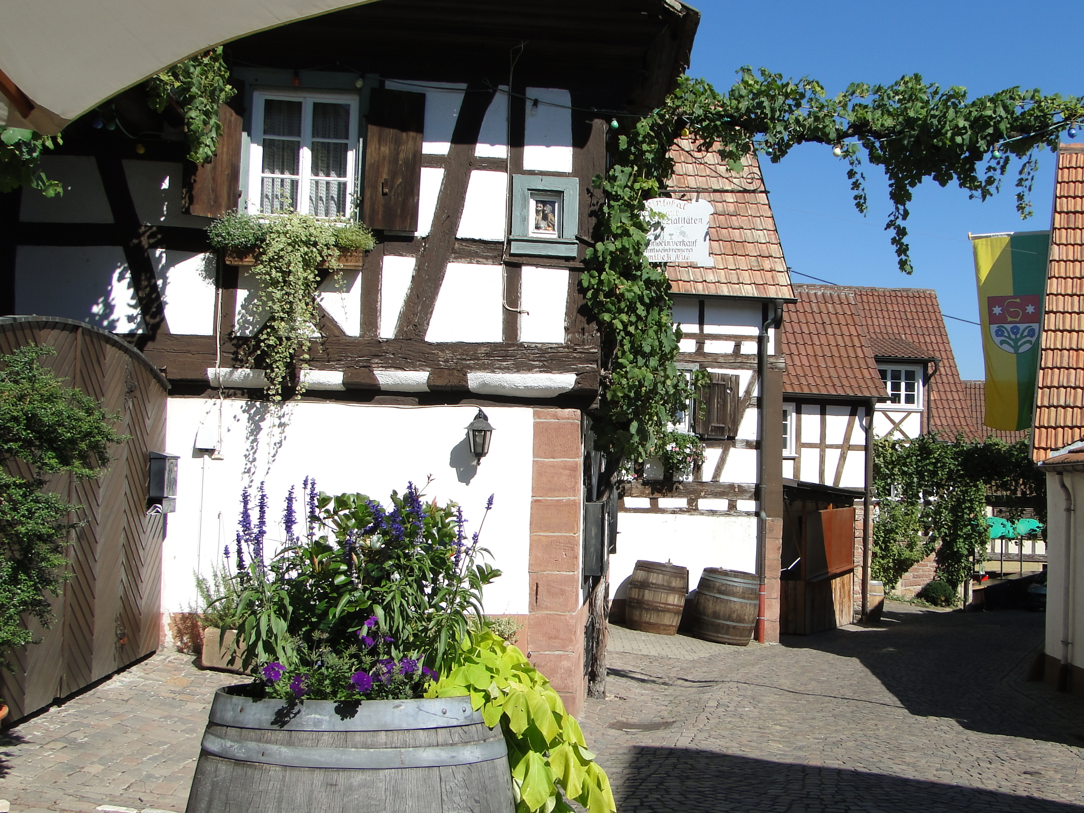 Winzergasse im Weindorf Gleiszellen in der Südpfalz